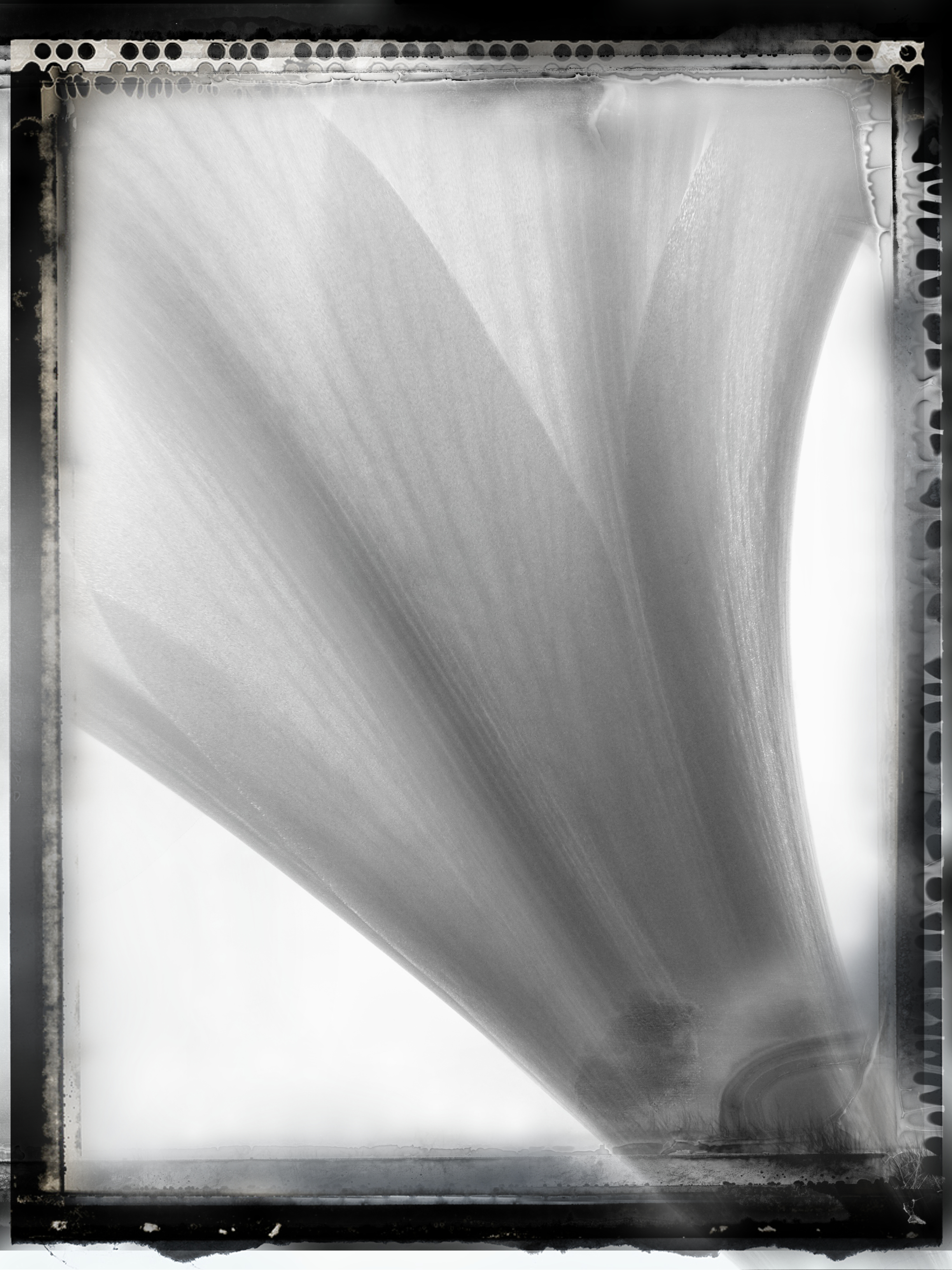 Das Aussehen einer Fotografie auf Polaroid Pan Pro T55 wurde digital nachempfunden